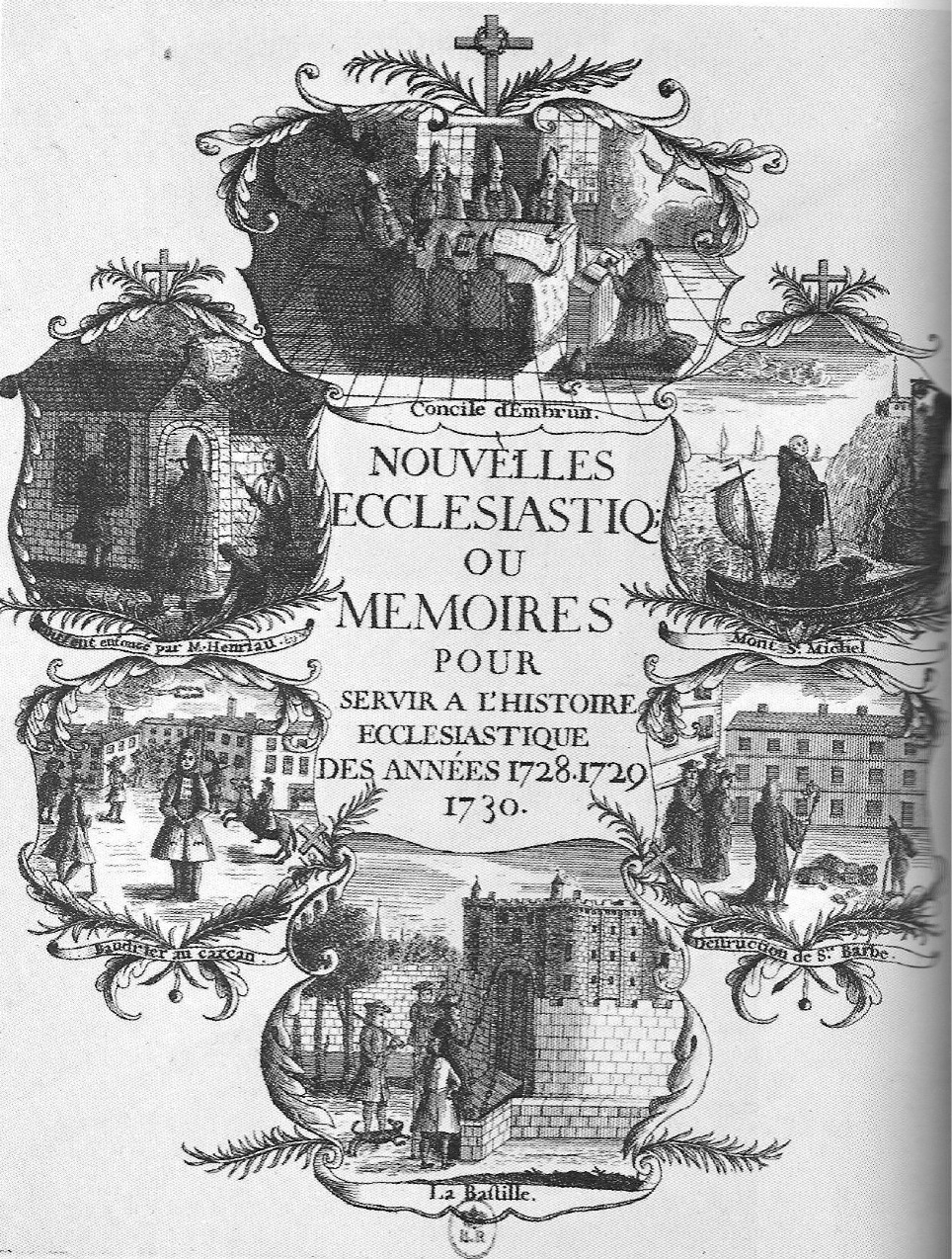 Nouvelles ecclésiastiques, hebdomadaire janséniste clandestin